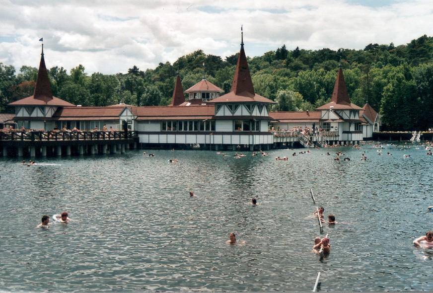 Quelle: selbst fotografiert im August 2000